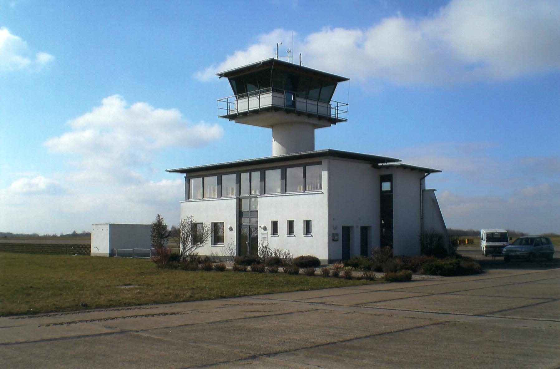 Flugplatz Stendal-Borstel Tower